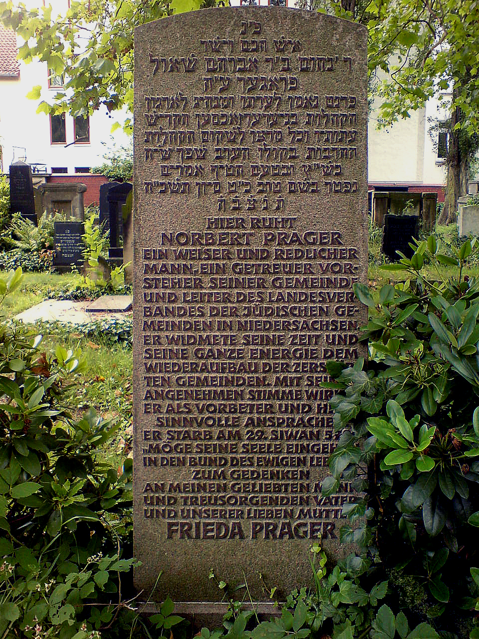 Grabmal von Norbert Prager und Ehefrau Frieda auf dem Jüdischen Friedhof an der Strangriede in Hannover